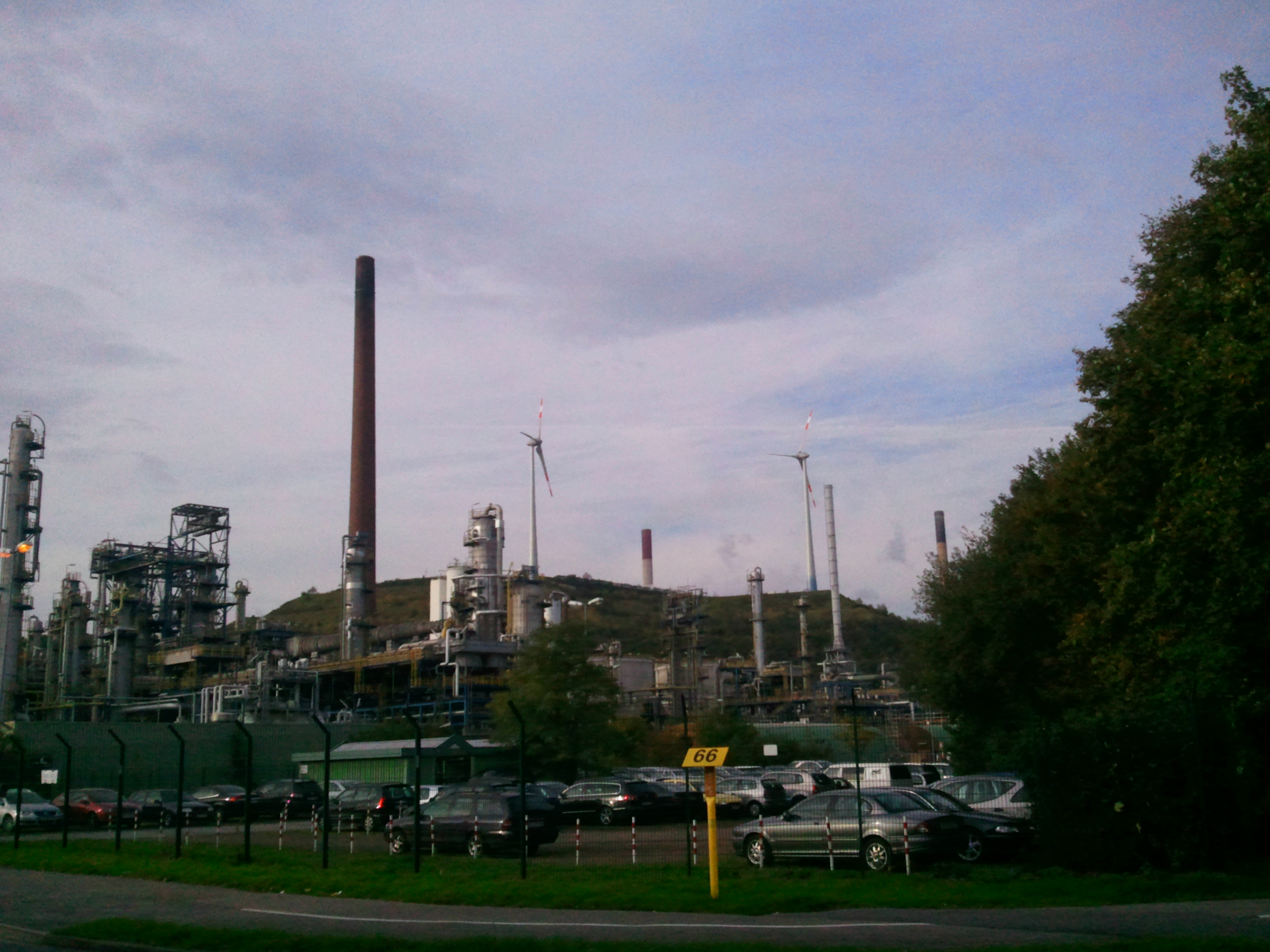 schnelles Handy-Foto von der Halde mit den von Juli bis Oktober 2010 neu errichteten Windrädern.